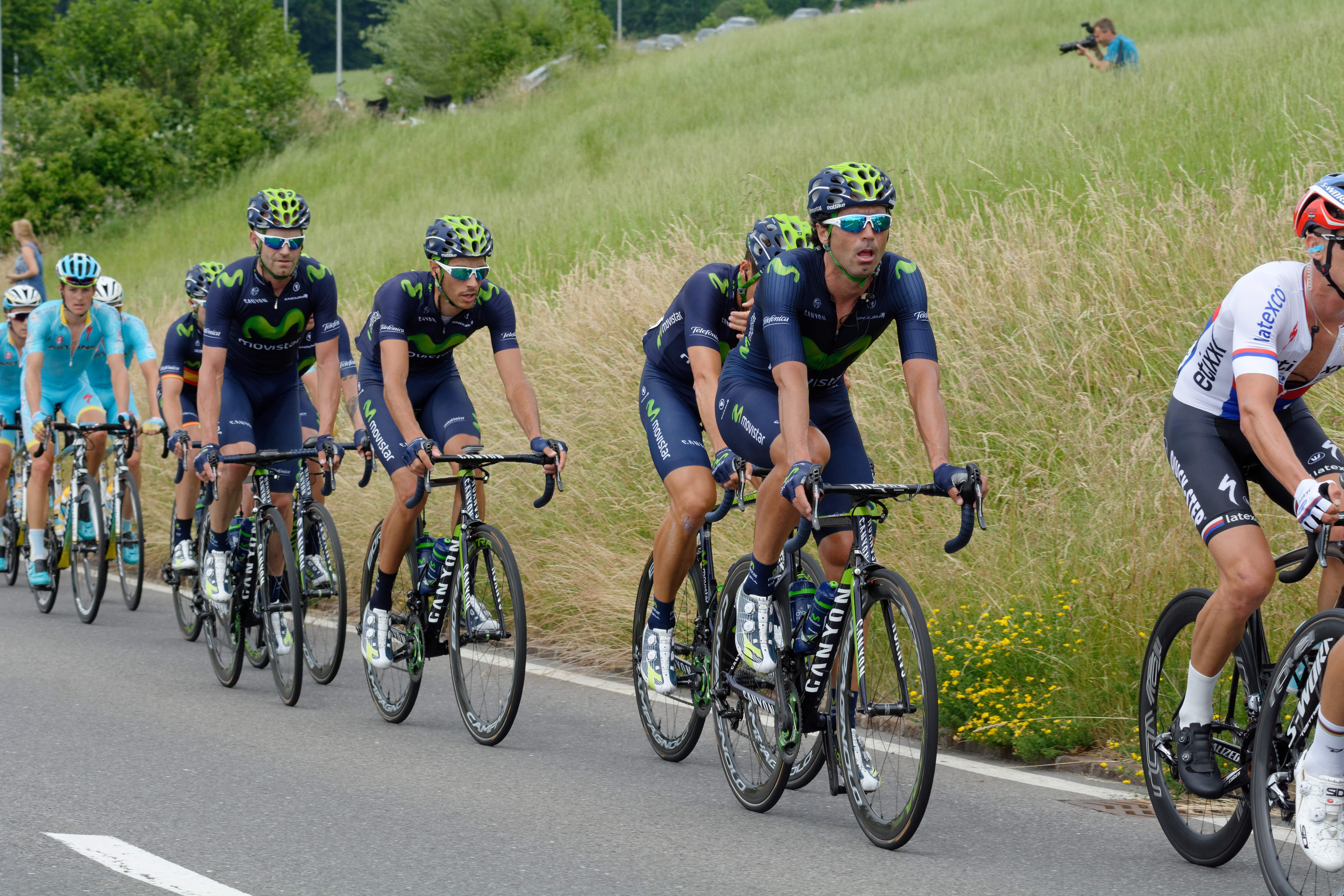 D71_0185_DxO